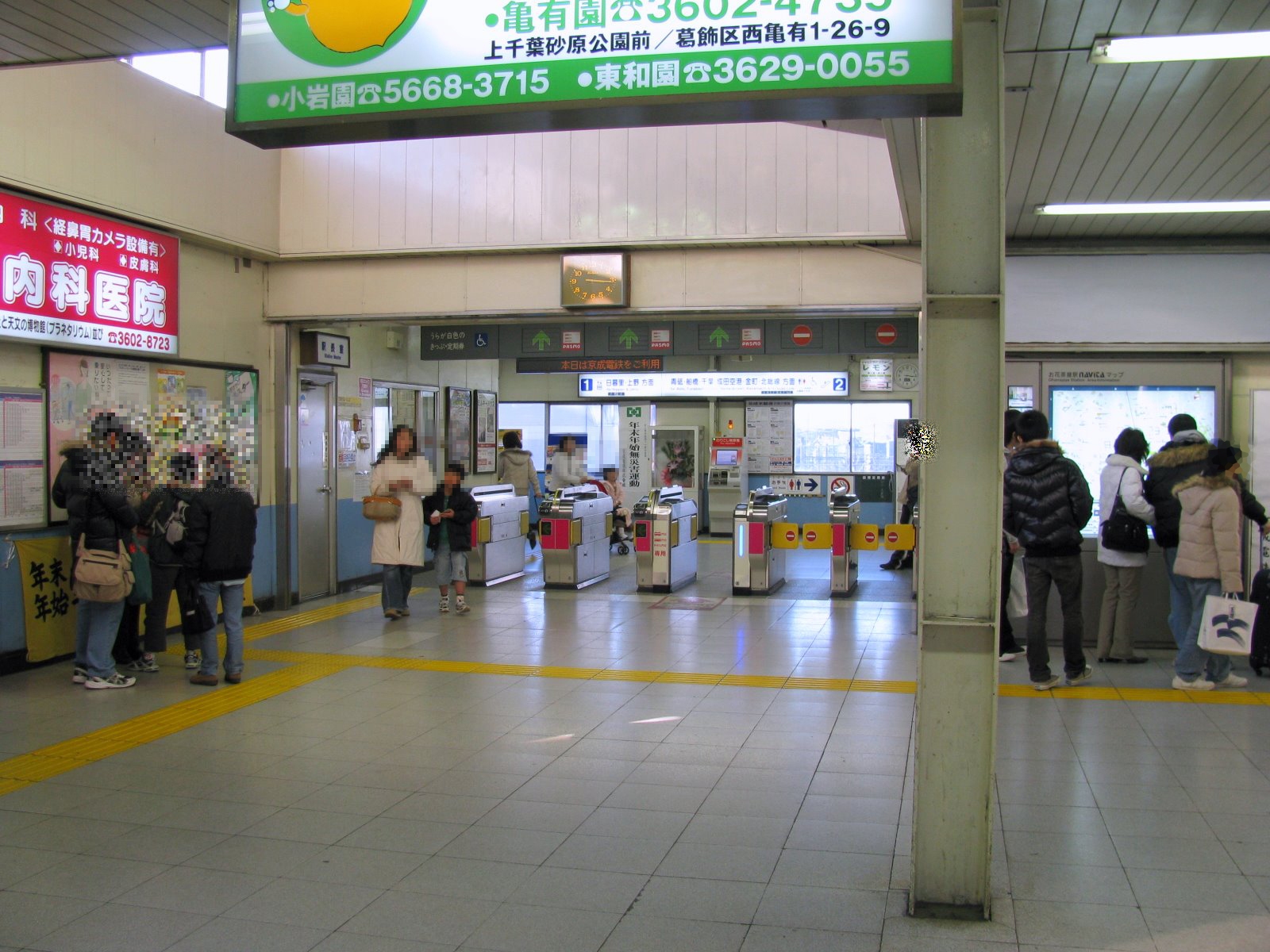 京成電鉄お花茶屋駅